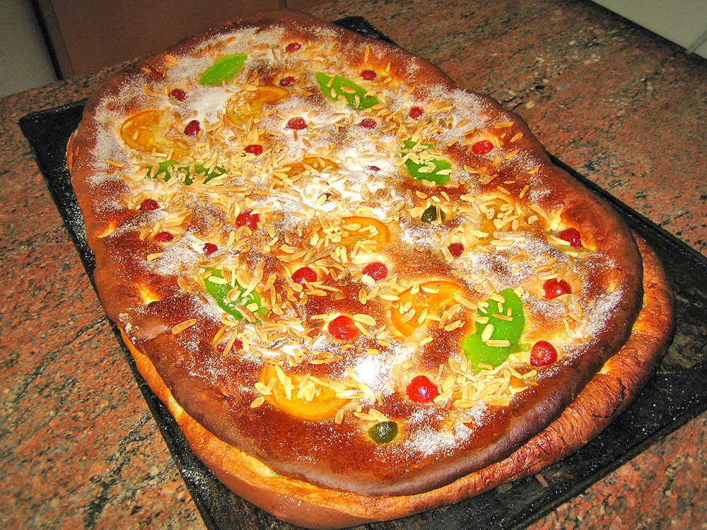 Coca de Sant Joan, typical catalan dessert